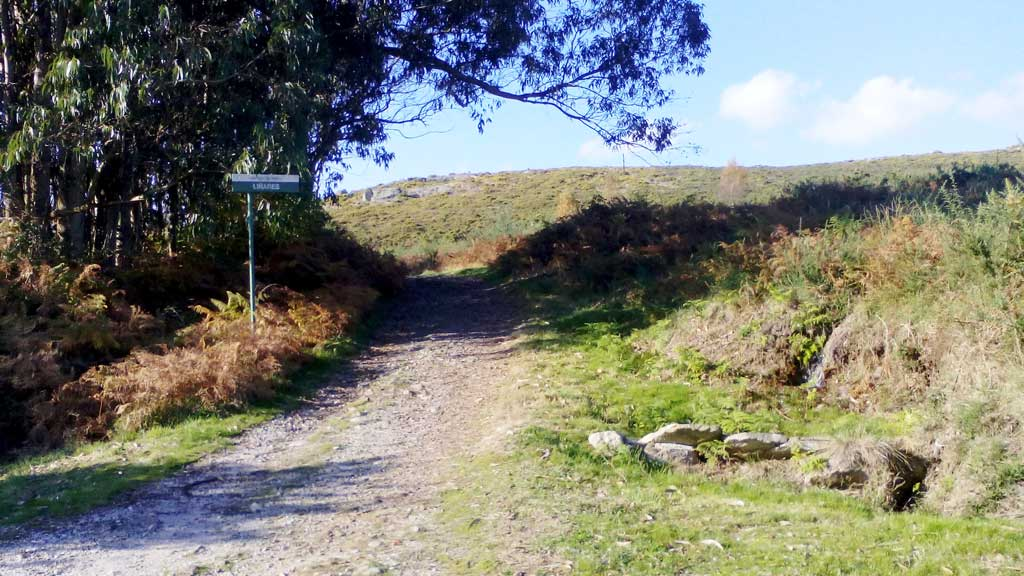 Lugar de Liñares.